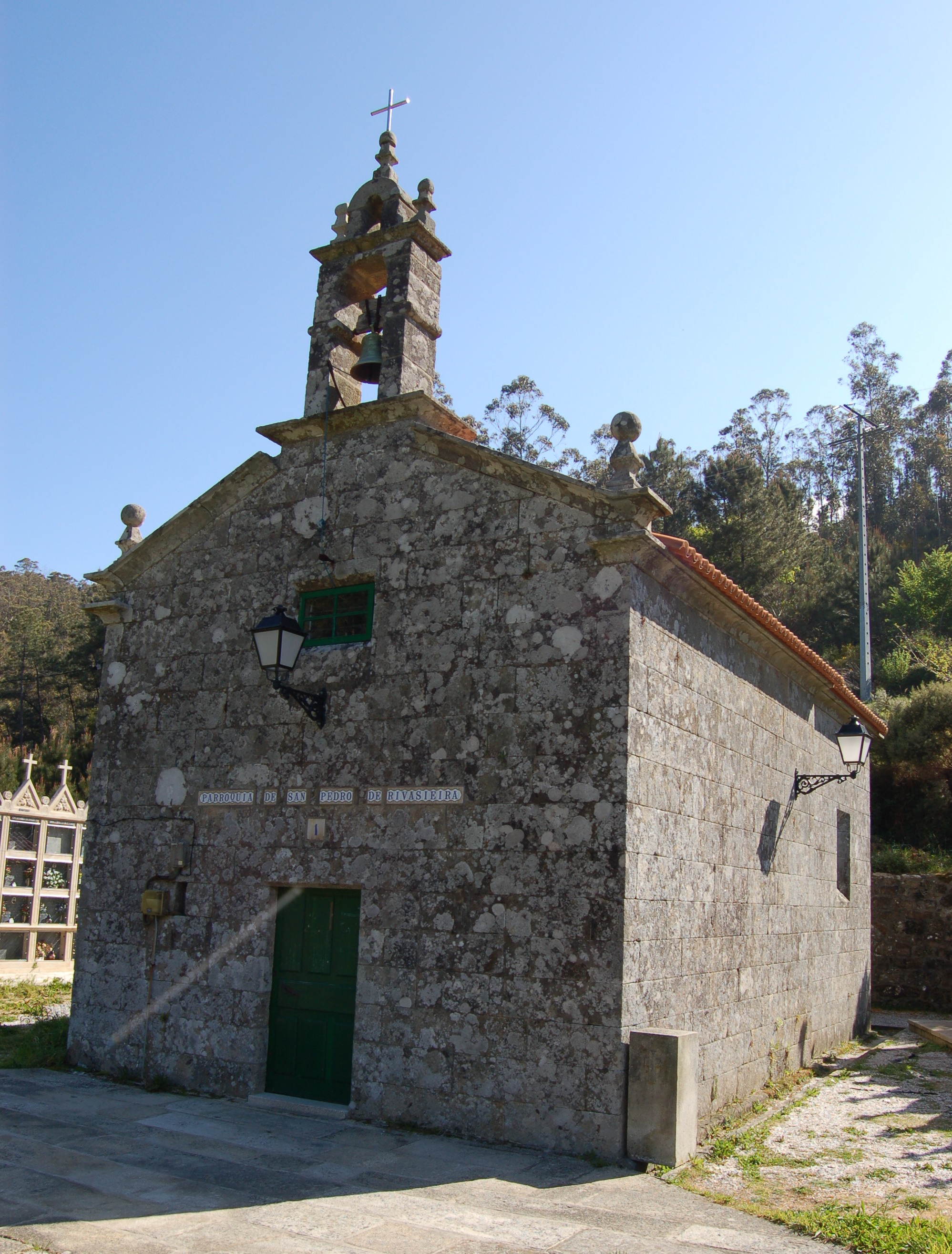 Igrexa parroquial de San Fins de Ribasieira (Porto do Son).